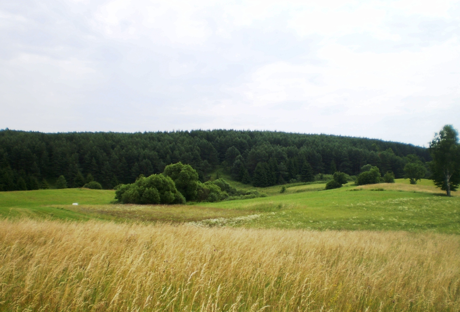 Pavištyčio kalnas, Vištyčio RP, Vilkaviškio raj.